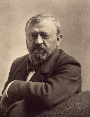 Bohuslav Raýman (1852-1910), český chemik, biochemik a vysokoškolský pedagog